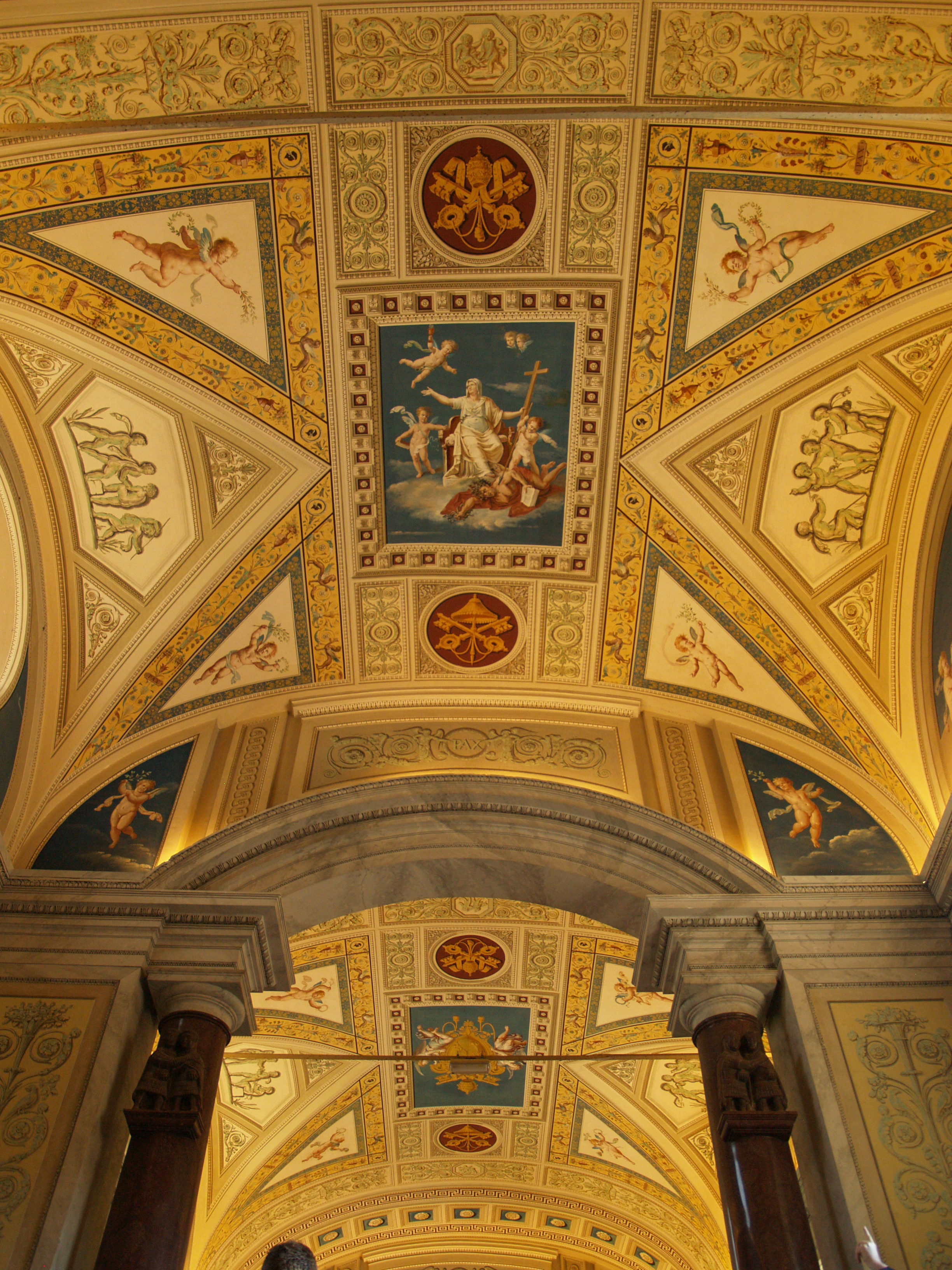 Biblioteca Vaticana, galería de Pío VI.